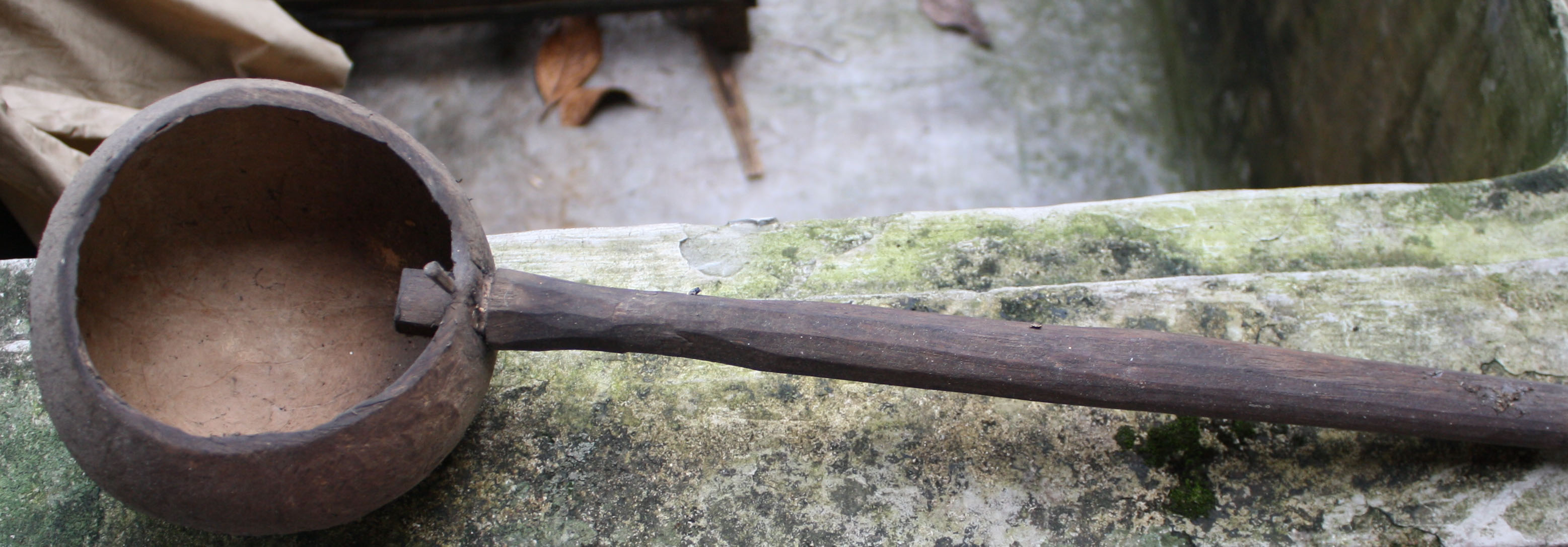 Beruk yaitu alat untuk mengambil air atau beras yang terbuat dari tempurung kelapa